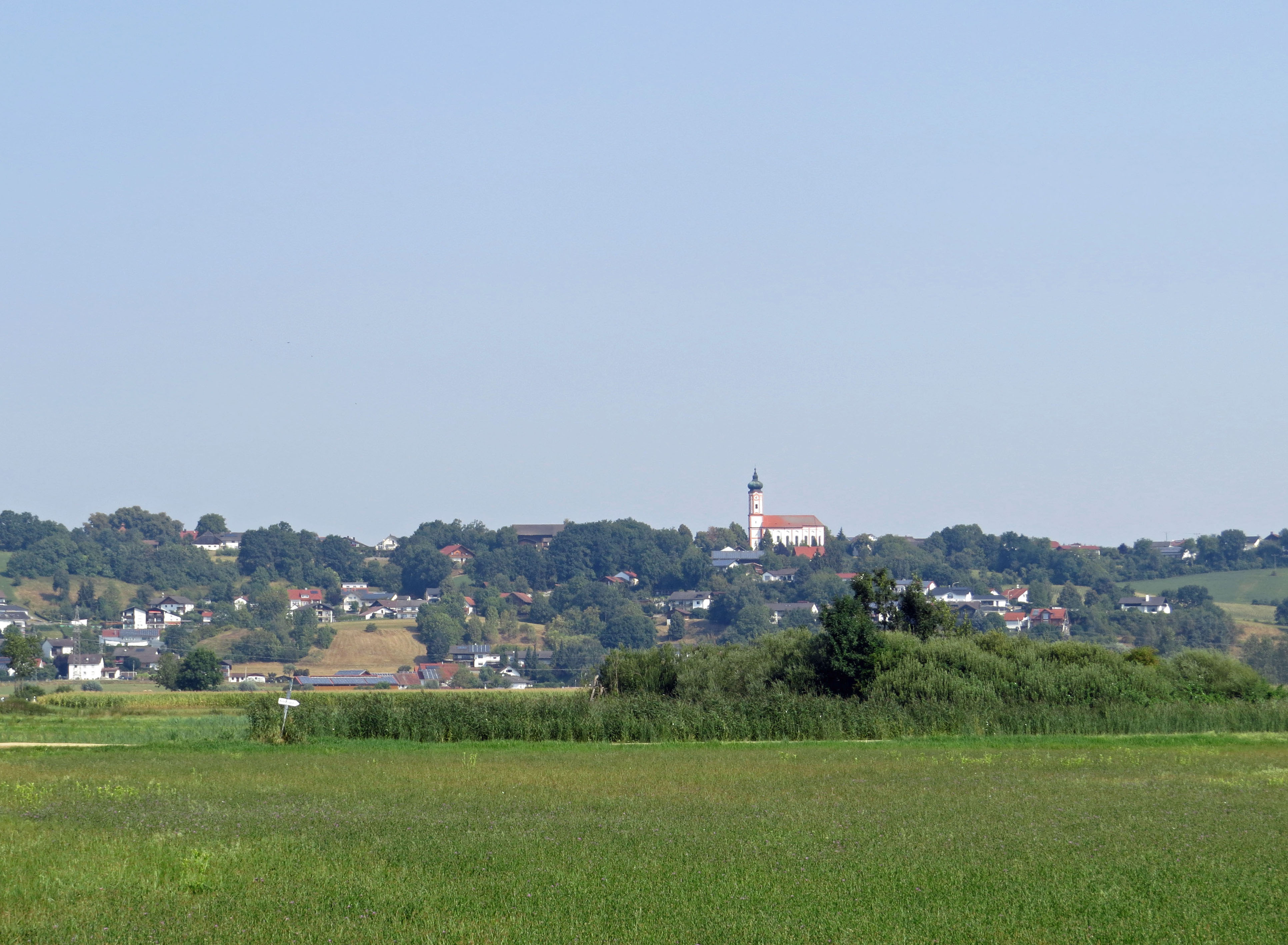 Thürnthenning von Süden, Moosthenning